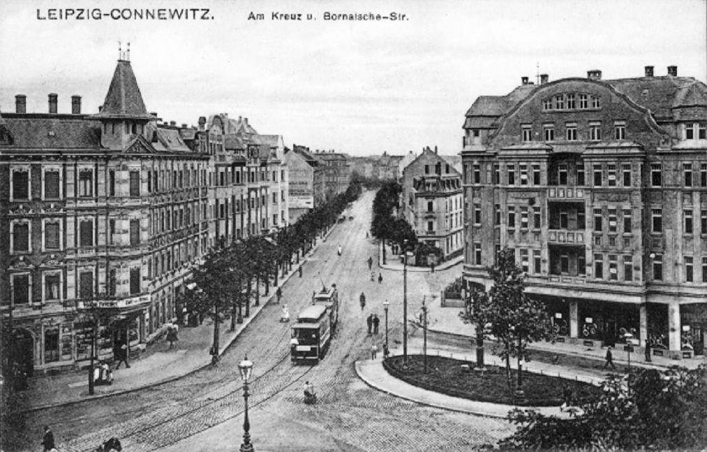 Am Connewitzer Kreuz mit Blick in die Bornaische Straße (1916)